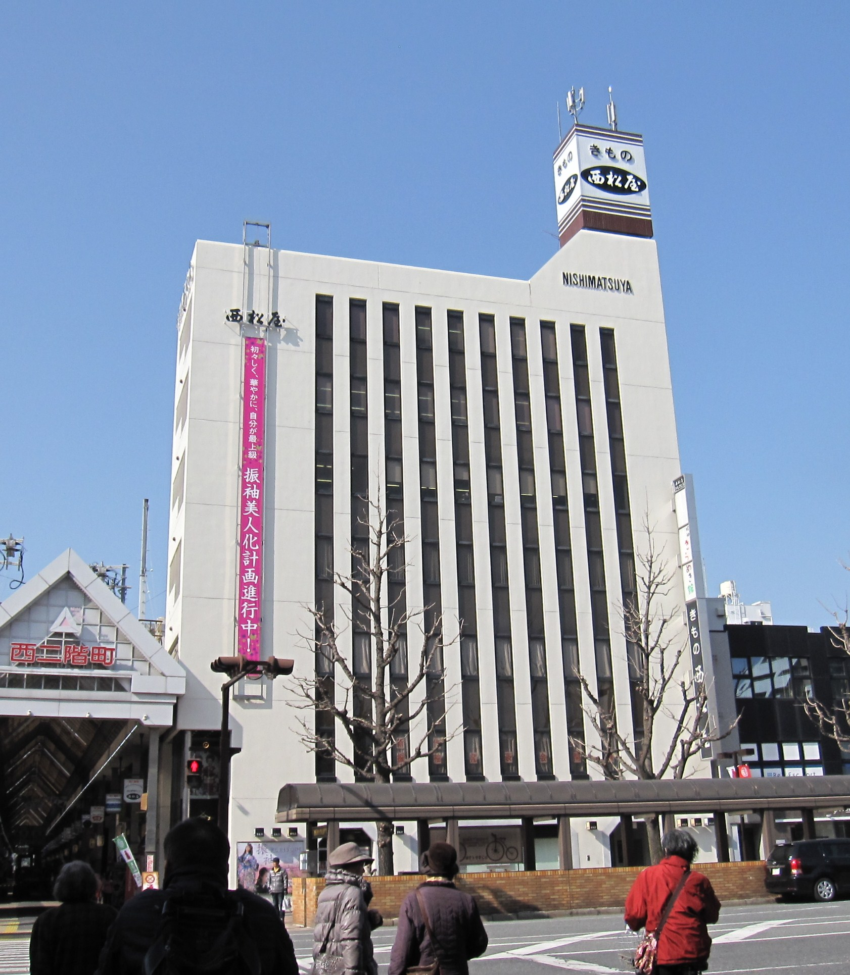 西松屋本店